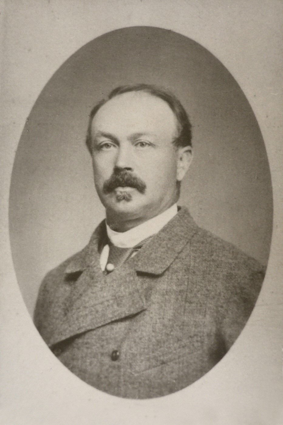 Porträtfotografie von August von Bönninghausen (1831–1904).